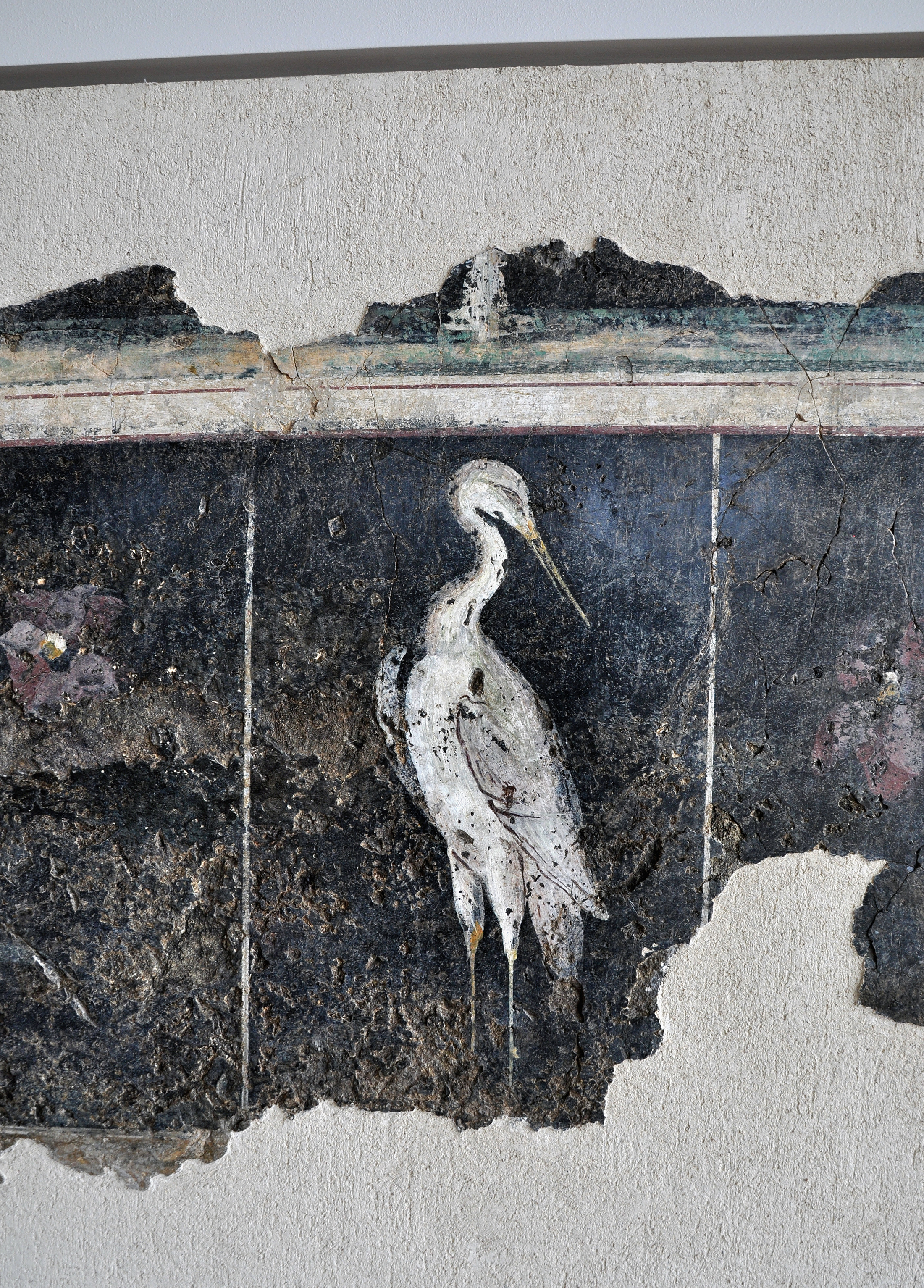 Echassier. Détail d'une peinture murale, datée du 1er siècle, et provenant du péristyle d'une maison gallo-romaine, découverte en 1977 rue du 11 Novembre à Vienne (France). Cette peinture représente des échassiers sur la plinthe et des génies ailés au sommet de mâts décorés sur le registre supérieur. Site et musée de Saint-Romain-en-Gal-Vienne.